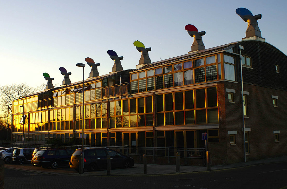 BedZed